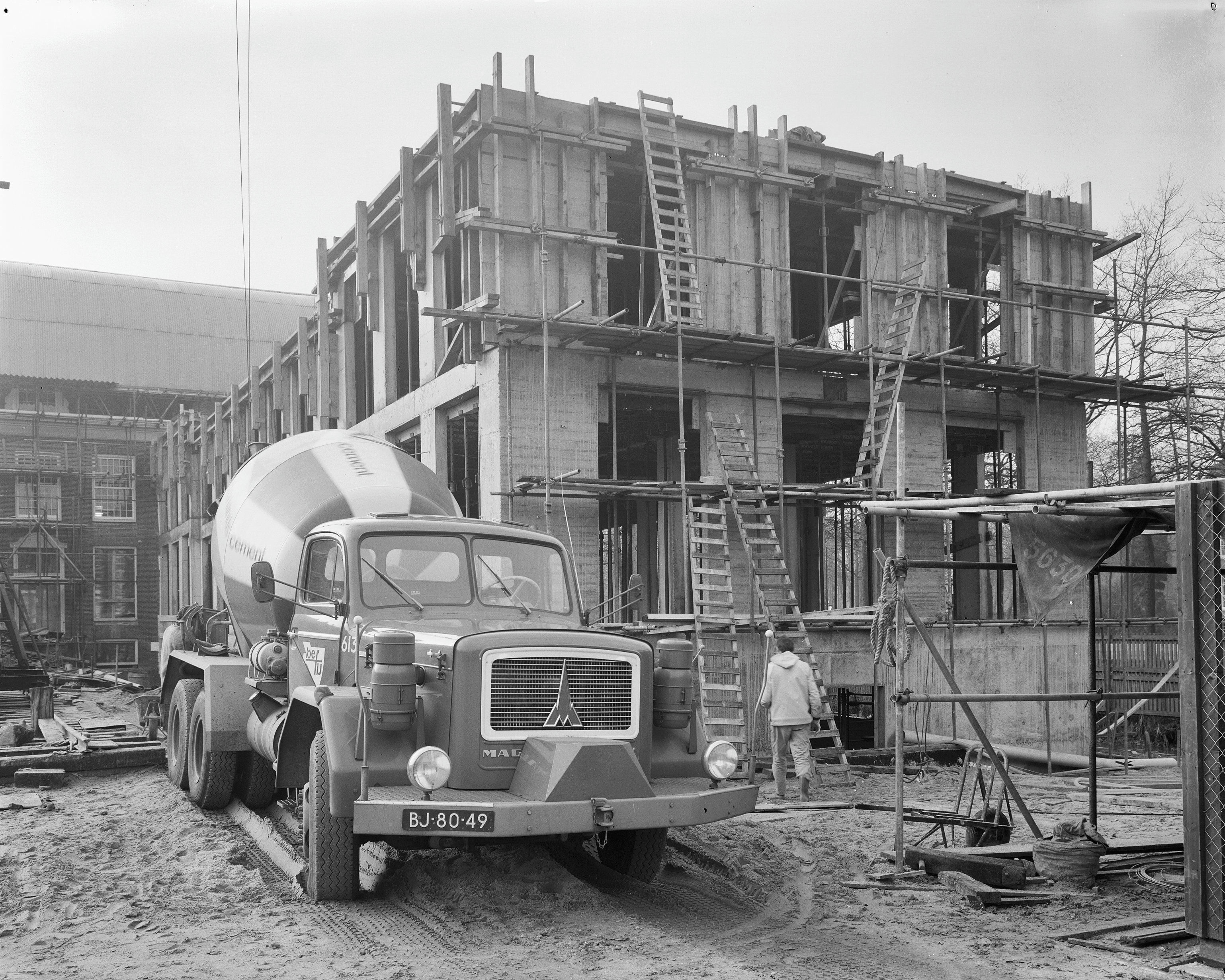 nieuwbouw, exterieur